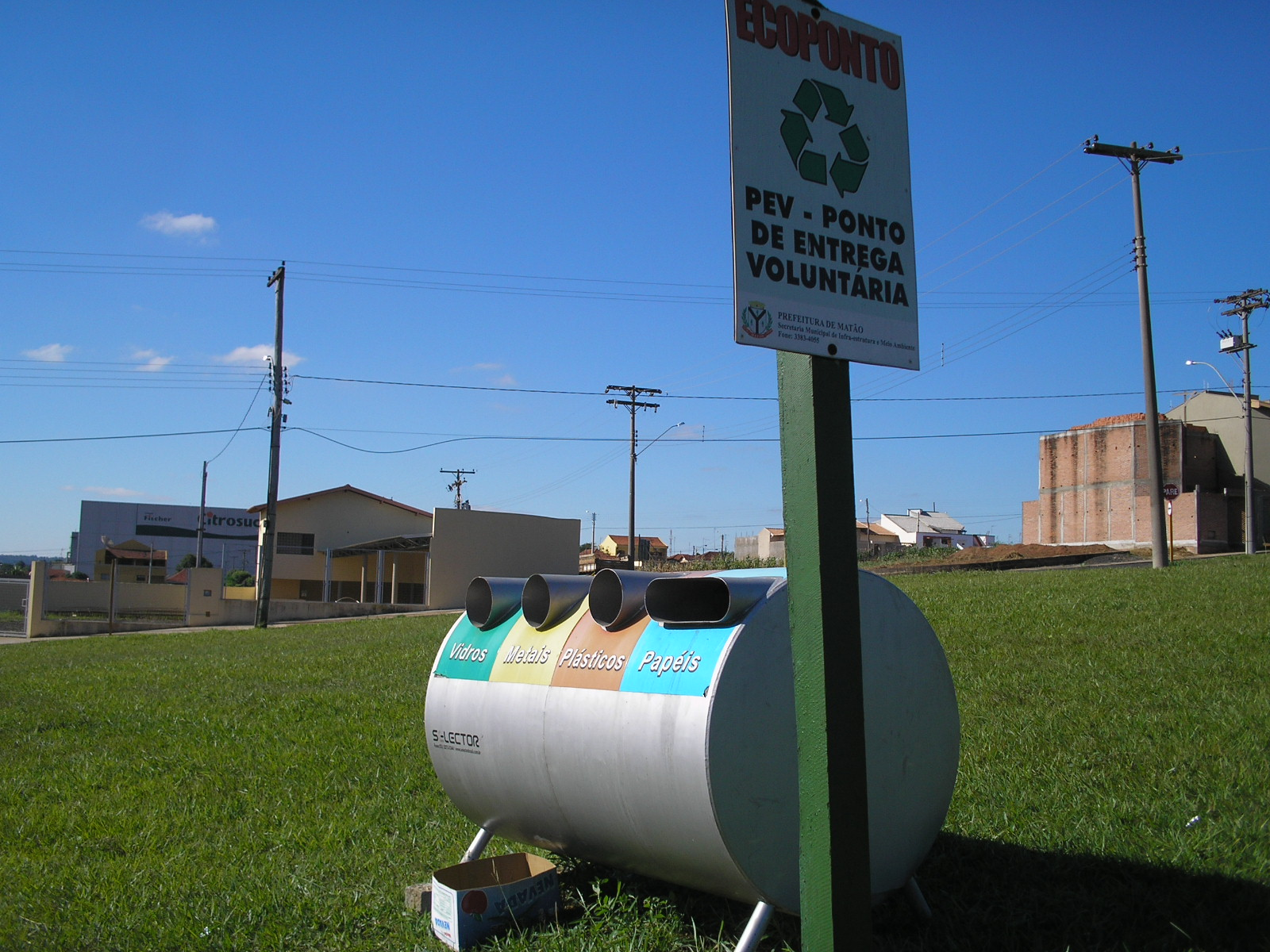 Coleta seletiva Ecoponto